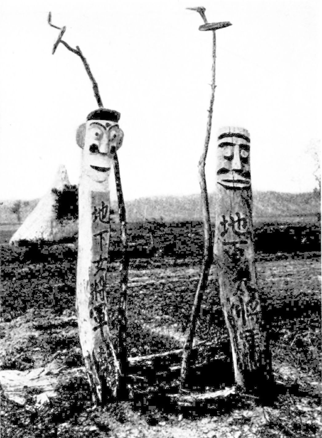 Village devil posts